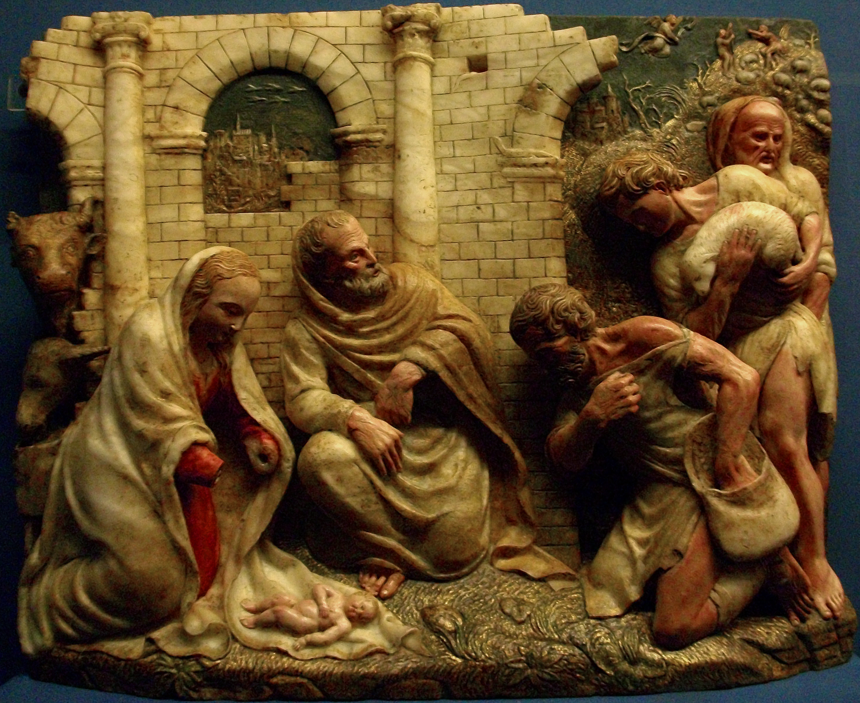 Damián Forment, Adoración de los pastores (1520-1530), alabastro policromado y dorado, 38 x 47 cm. Procede de la Iglesia parroquial de Santiago Apóstol de Sobradiel (Zaragoza) perteneciente al Arzobispado de Zaragoza. Expuesta en 2009 y 2010 en la exposición itinerante «El esplendor del Renacimiento en Aragón» en el Museo de Bellas Artes de Bilbao, el Museo de Bellas Artes de Valencia y el Museo de Zaragoza.